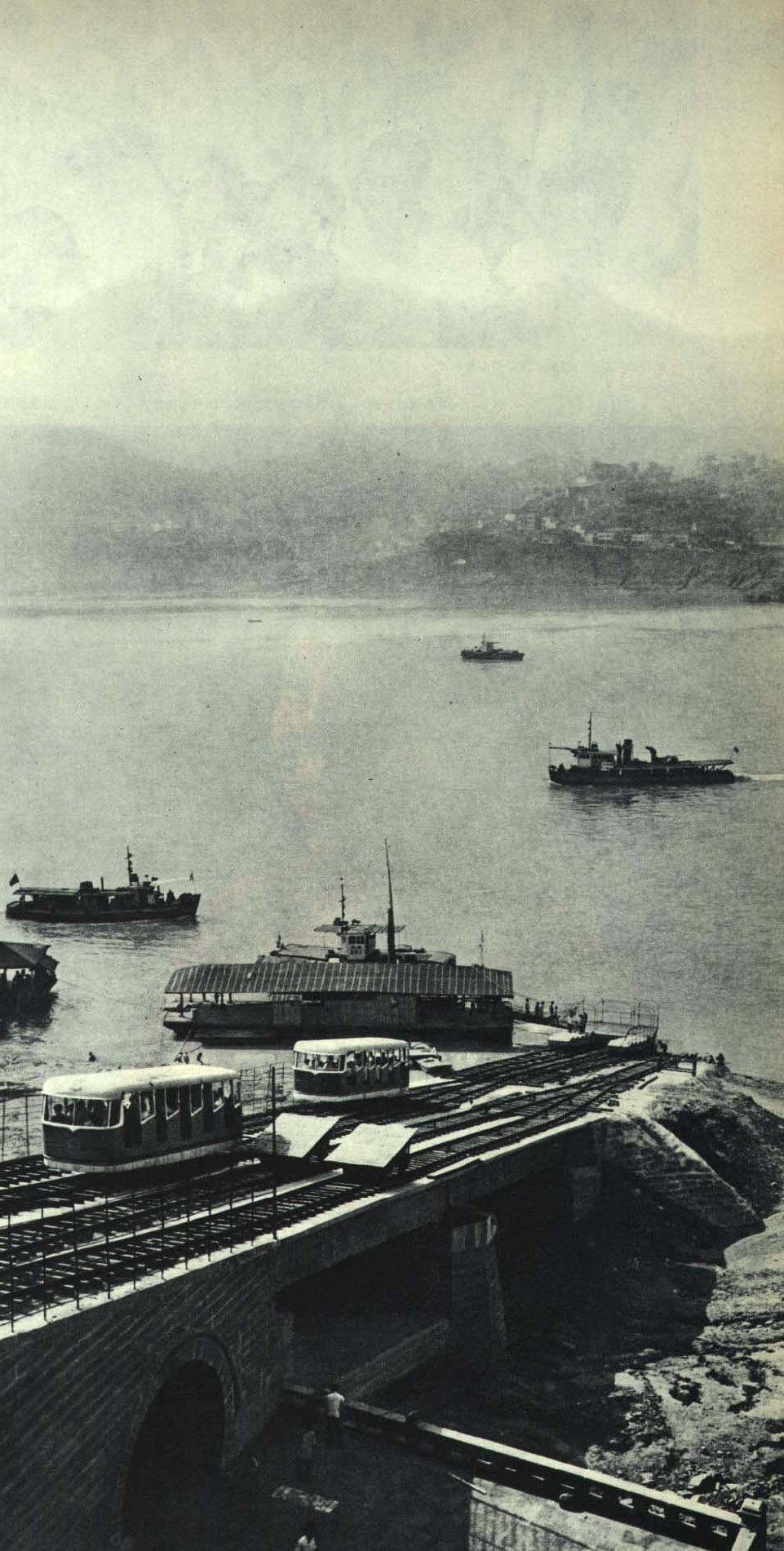 1963-09 1963年 储奇门